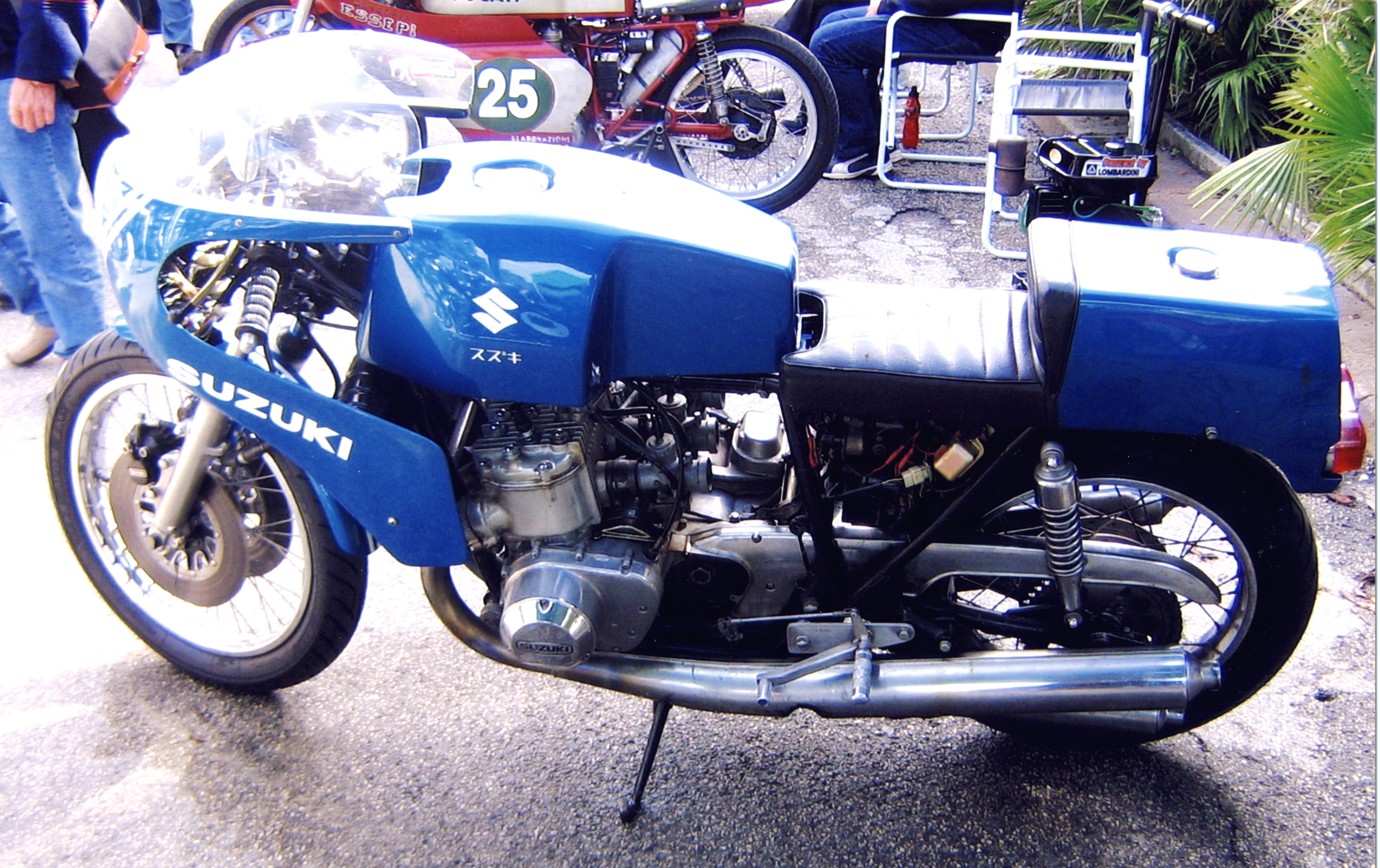 Suzuki GT 750 S "Vallelunga" del 1973, partecipante al GP Riviera di Rimini del Maggio 2007. Proprietà Giorgio Camprincoli.